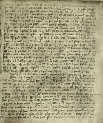 Page du Hauksbók mentionnant la colonie viking d'Herjolsnes